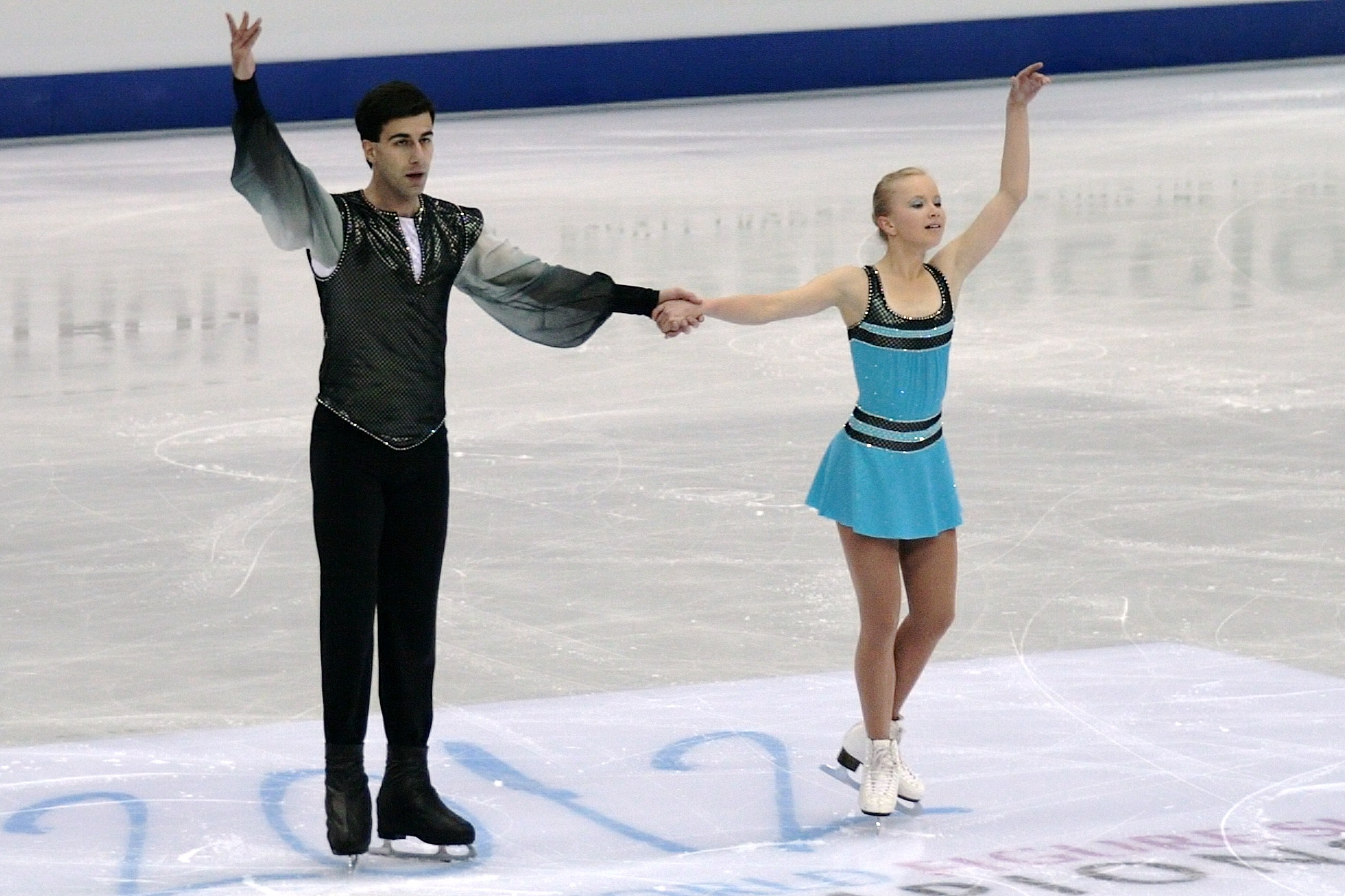 Елизавета Макарова и Лери Кенчадзе на чемпионате мира по фигурному катанию 2012 года.